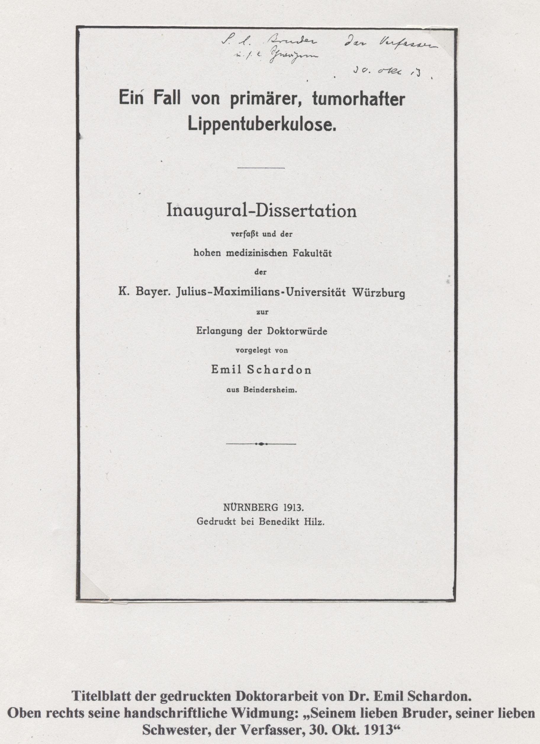 Eigener Scan vom eigenen Buch, Dissertation Emil Schardon, Beindersheim 1913